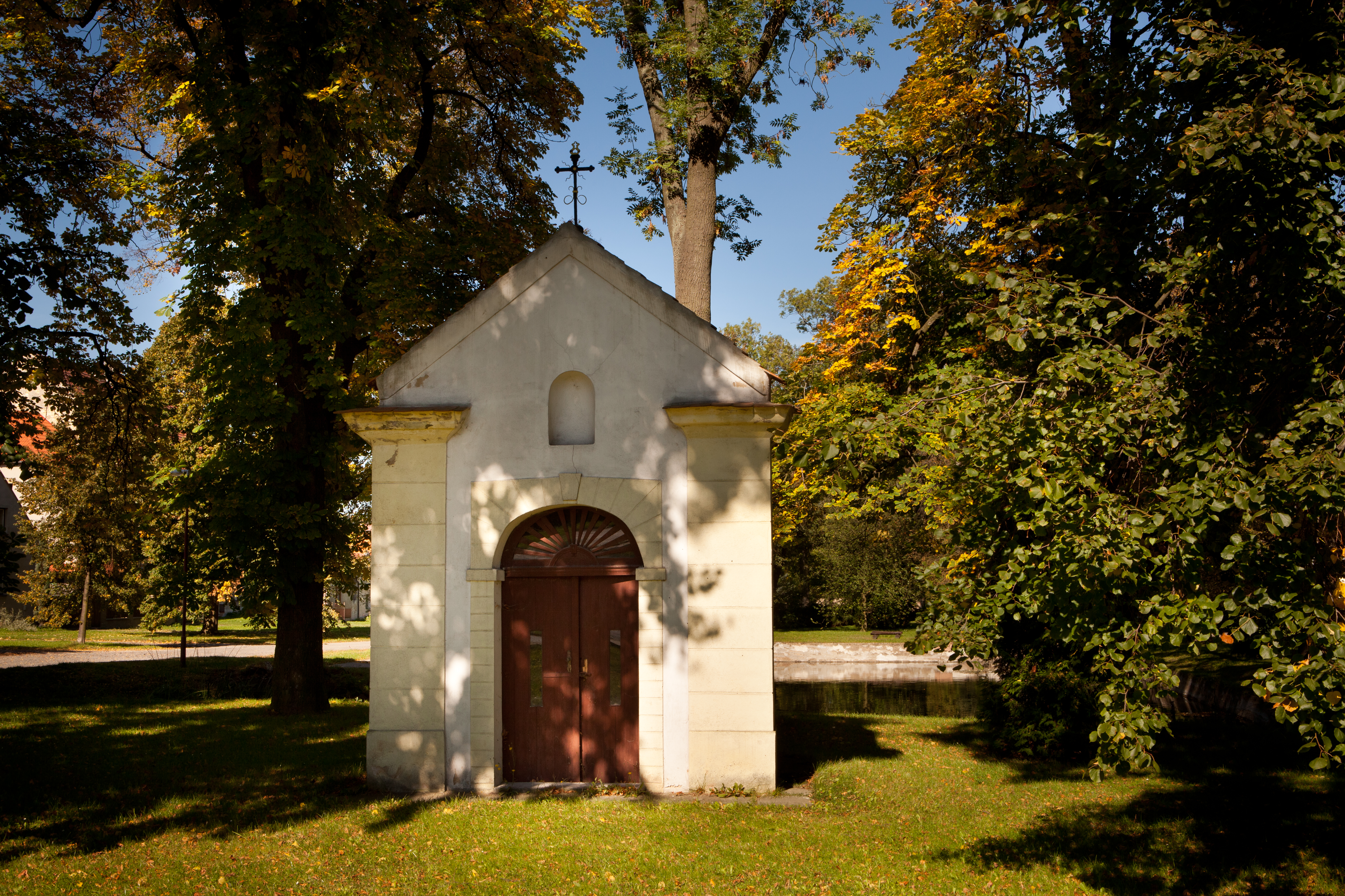 Kaple sv. Anny (Řevničov), Tyršovo nám., Řevničov